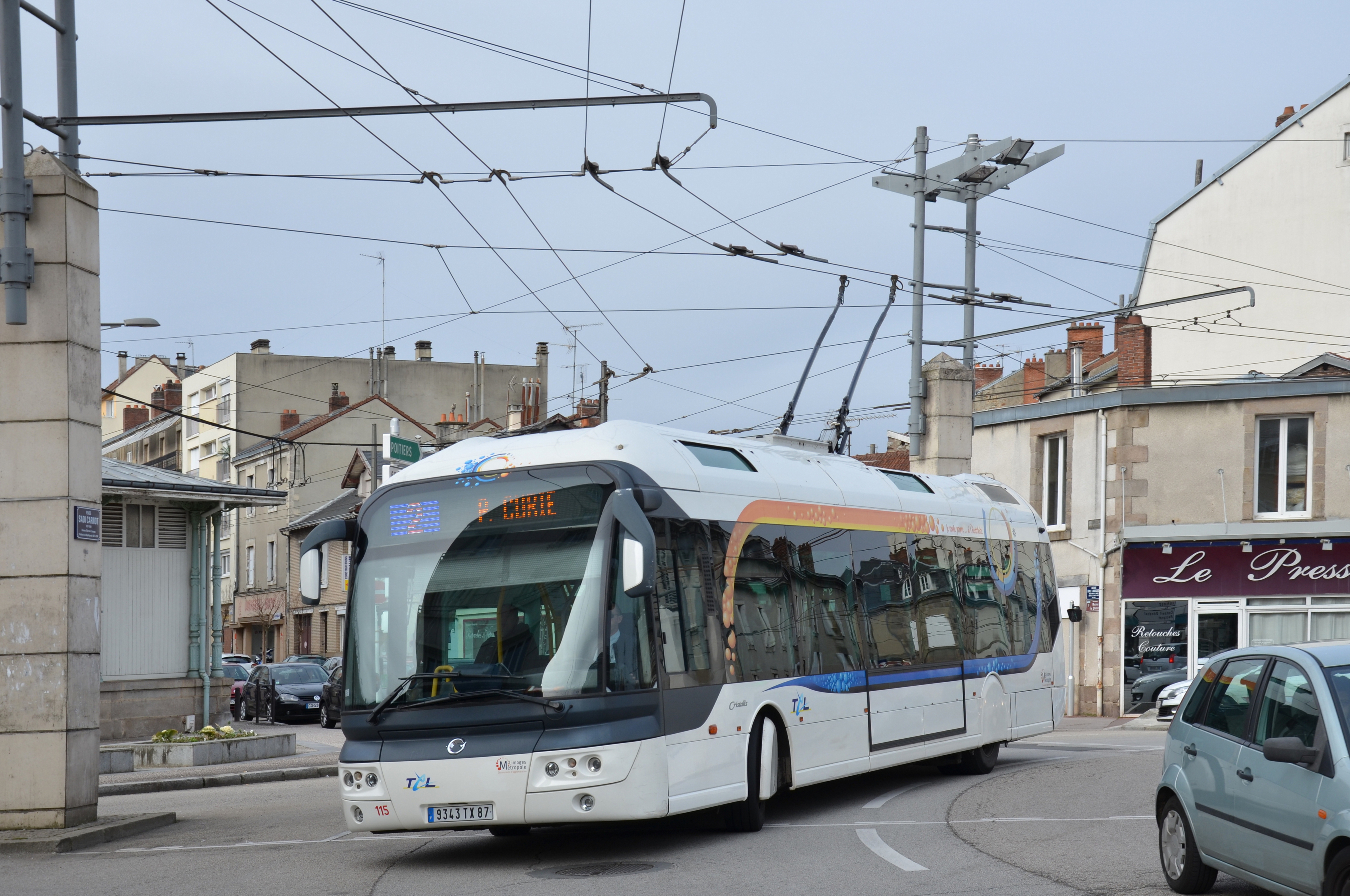 Irisbus Cristalis ETB 12 n°115 sur la ligne 2 du réseau TCL de Limoges, à Place Carnot.